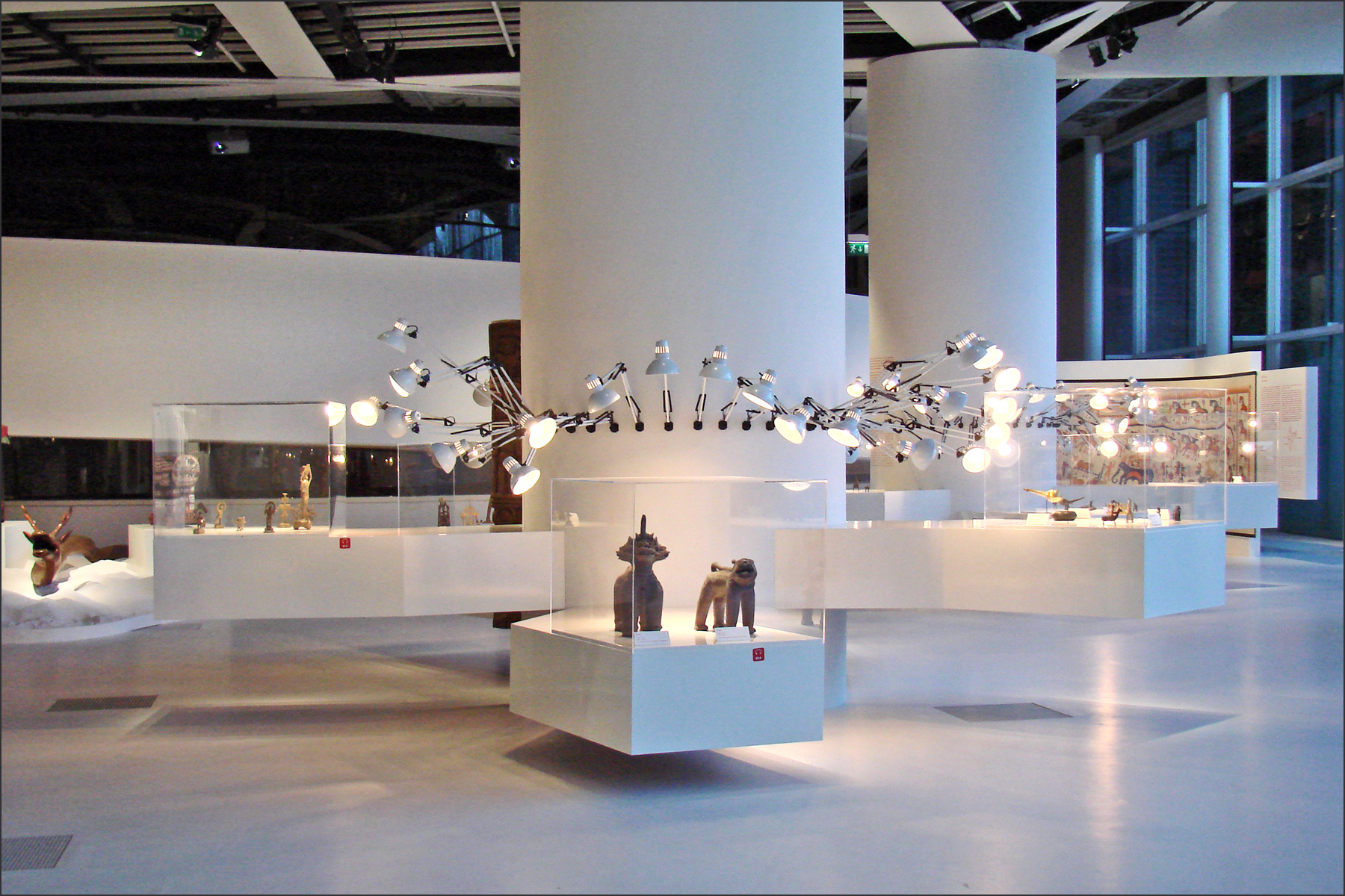 Image de l'exposition "Autres Maîtres de l'Inde, créations contemporaines des Adivasi " Musée du Quai Branly Paris